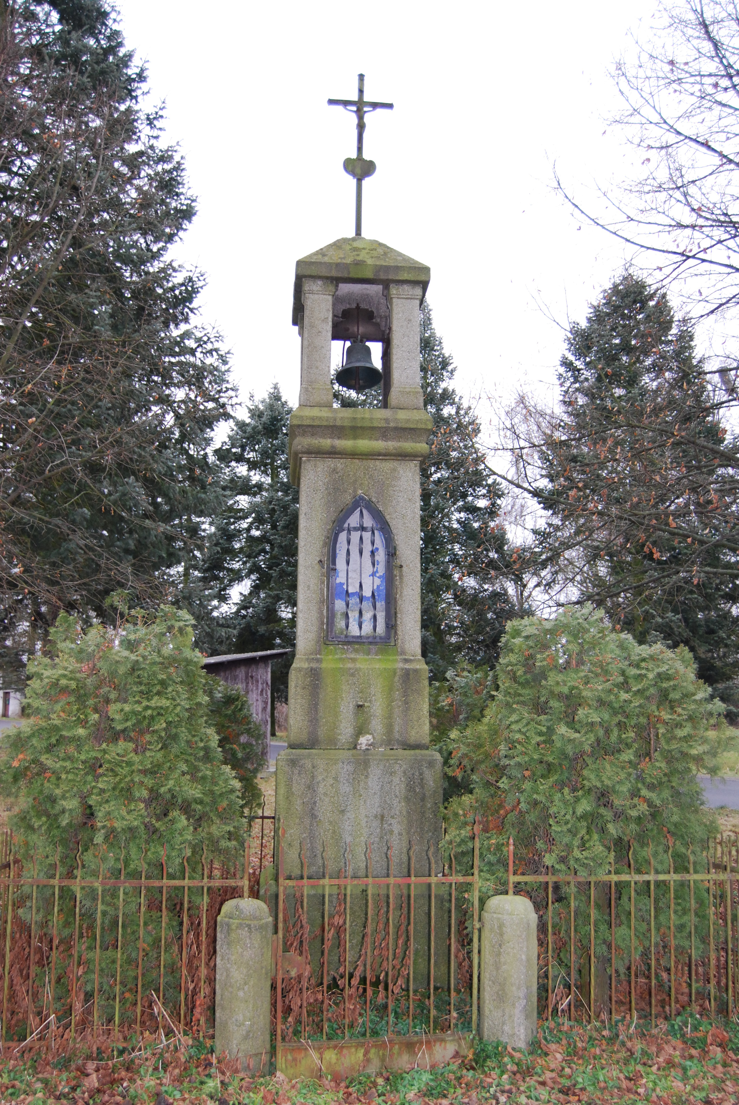 Zvonice v obci. Janov je malá vesnice, část obce Kosova Hora v okrese Příbram. Česká republika.